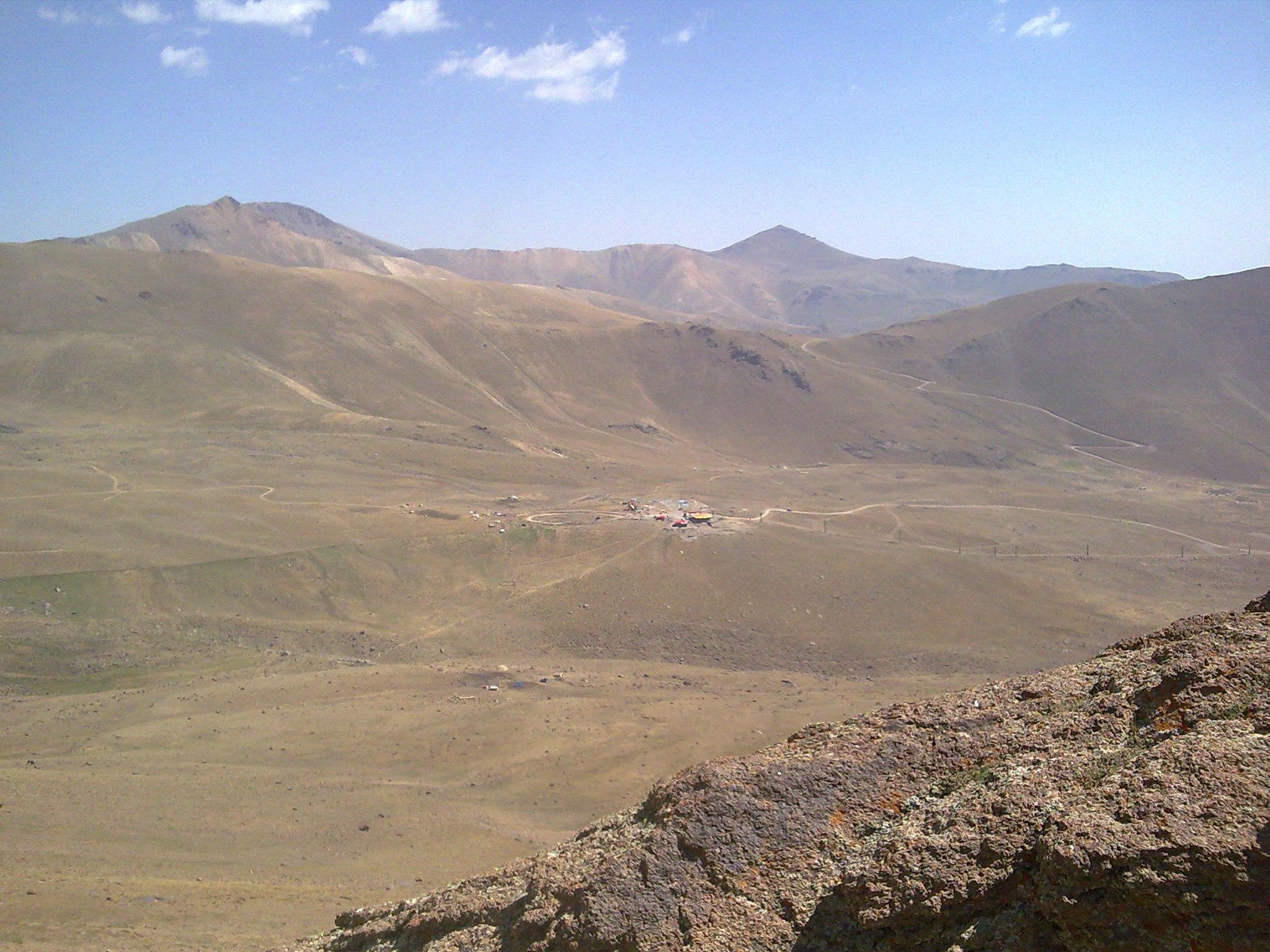 چشم اندازی از قله حاج مقصود از ارتفاعات آلوارز